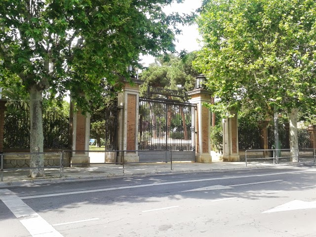 Tanca i portalada del parc (Mataró)